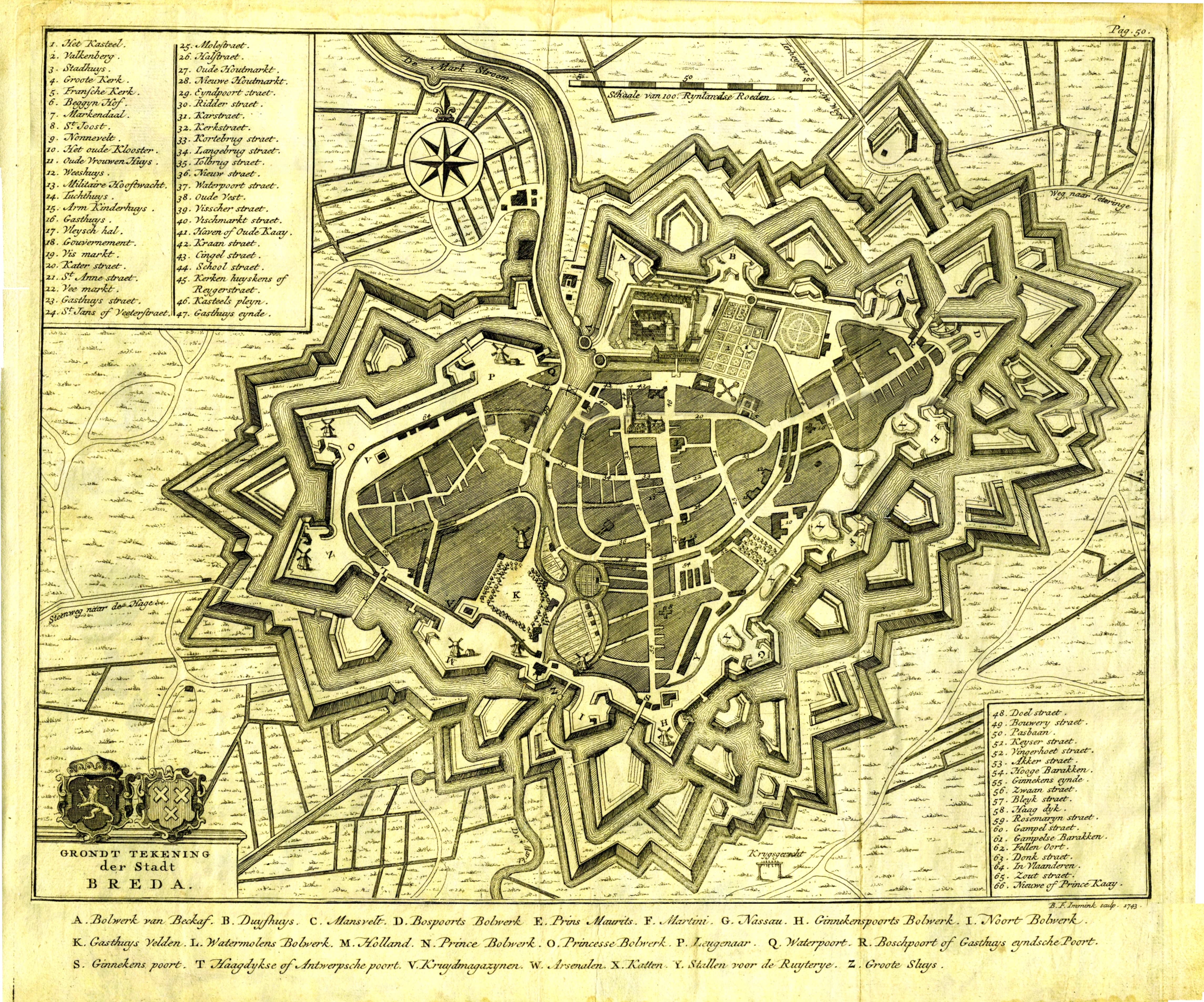 De Grondt tekening van Breda uit 1743, zoals gegraveerd door B.F. Immink